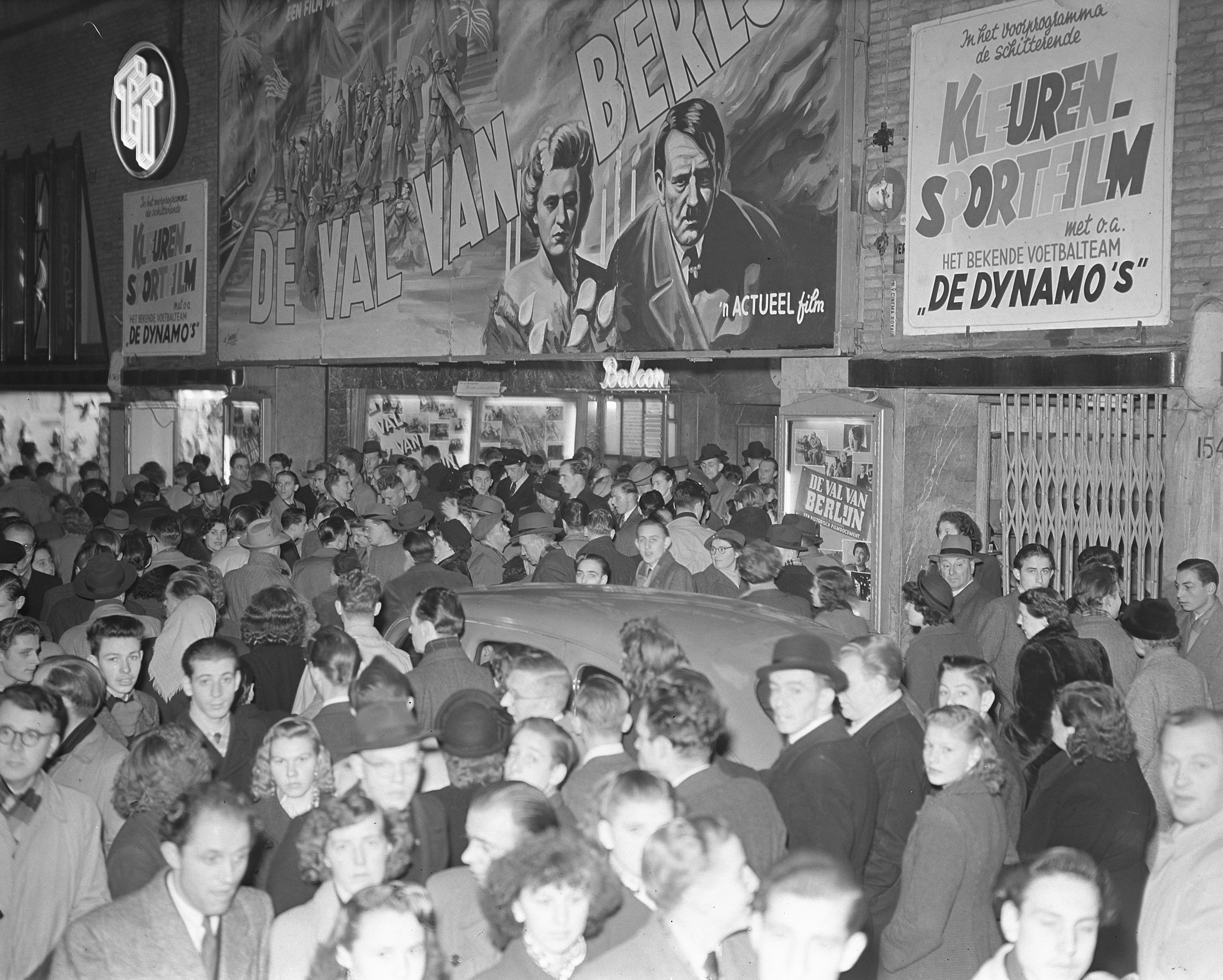 Collectie / Archief : Fotocollectie Anefo Reportage / Serie : [ onbekend ] Beschrijving : Film "De Val van Berlijn" in bioscoop Royal te Amsterdam [betreft Russische film "Padeniye Berlina"] Datum : 8 december 1950 Locatie : Amsterdam, Noord-Holland Trefwoorden : bioscopen, films, publiek, reclame Persoonsnaam : Royal Fotograaf : Bilsen, Joop van / Anefo Auteursrechthebbende : Nationaal Archief Materiaalsoort : Glasnegatief Nummer archiefinventaris : bekijk toegang 2.24.01.09 Bestanddeelnummer : 904-3434